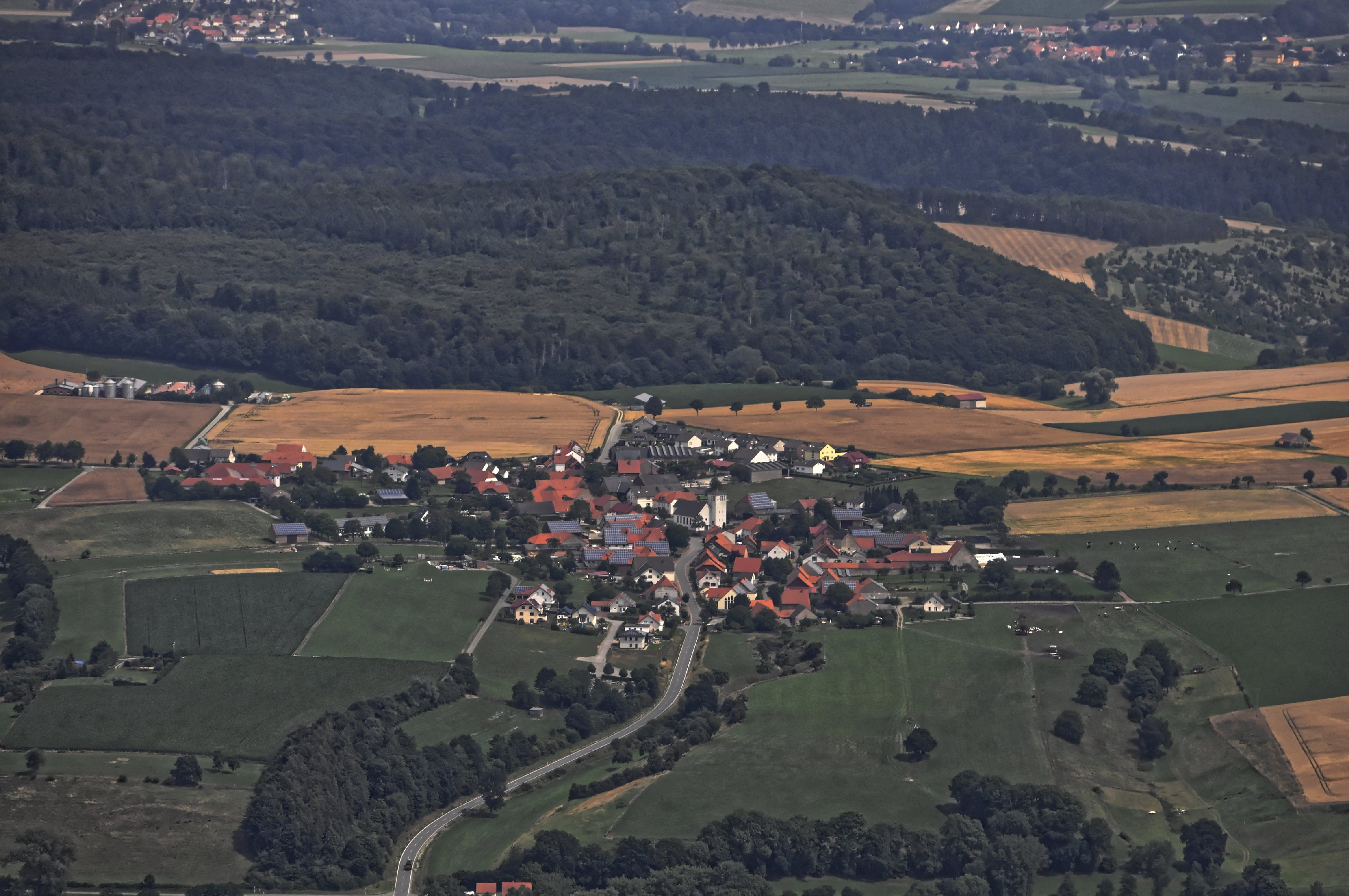 Bilder vom Flug Nordholz-Hammelburg 2015: Muddenhagen